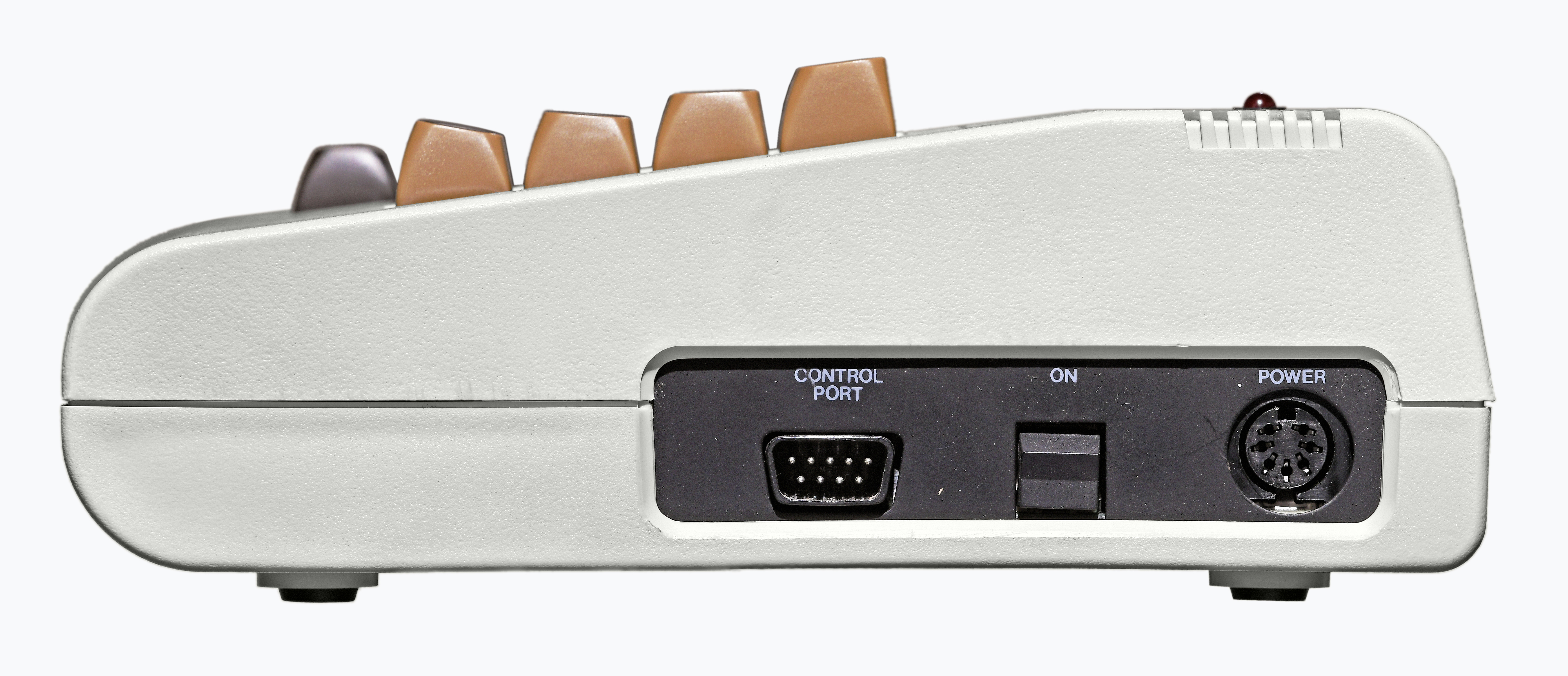 Commodore Computer VC20 Gehäuse Seite.